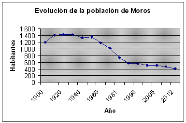 Evolución de la Población de Moros durante el siglo XX